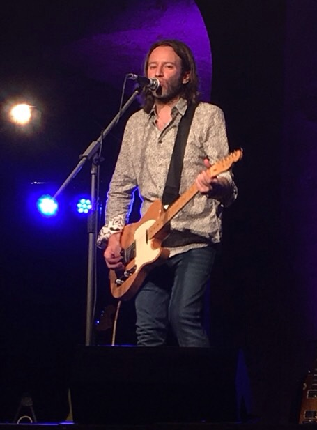 Riccardo Maffoni in concerto, giugno 2018.